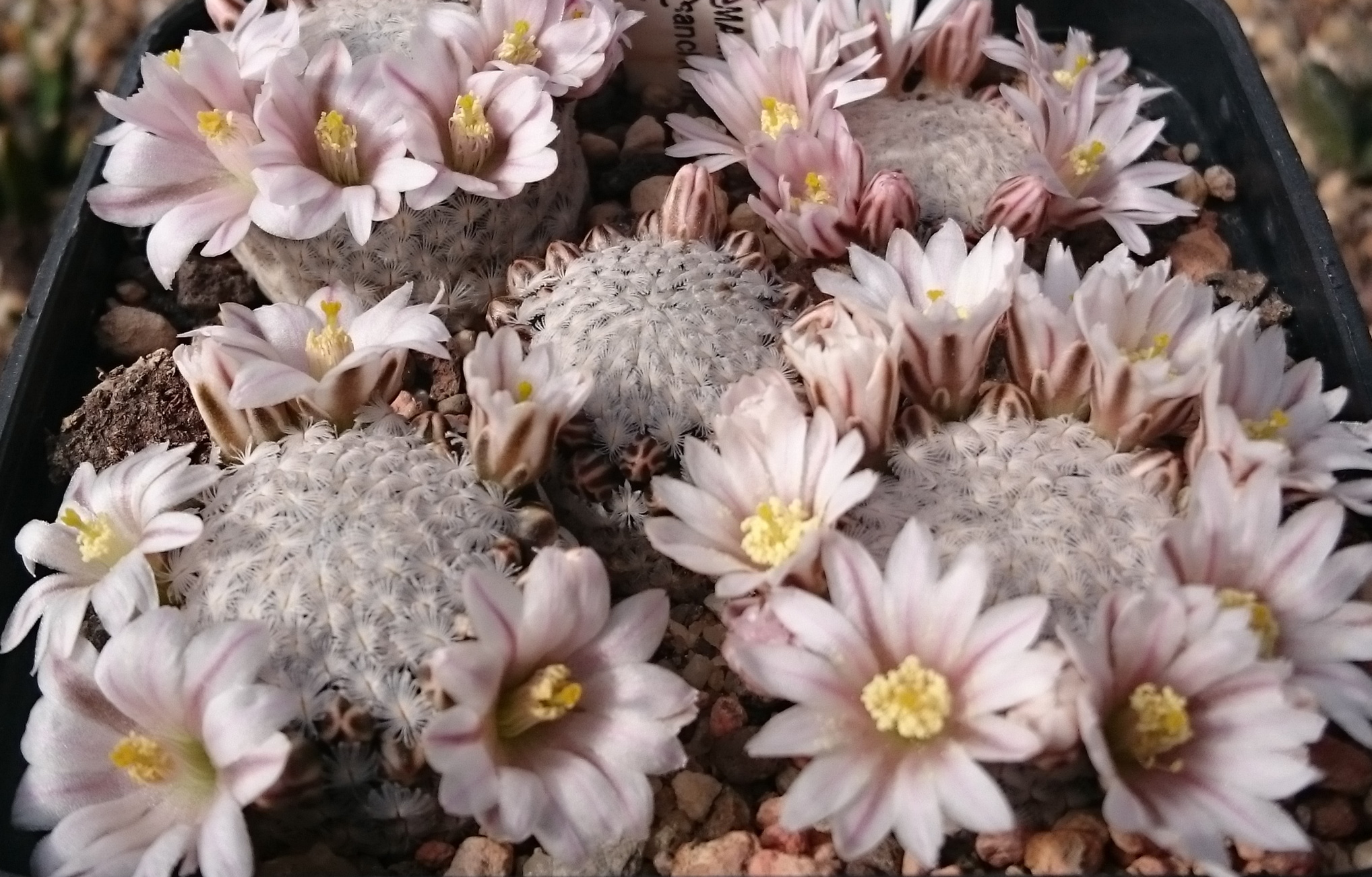 Mammillaria sanchez-mejoradae in Blüte